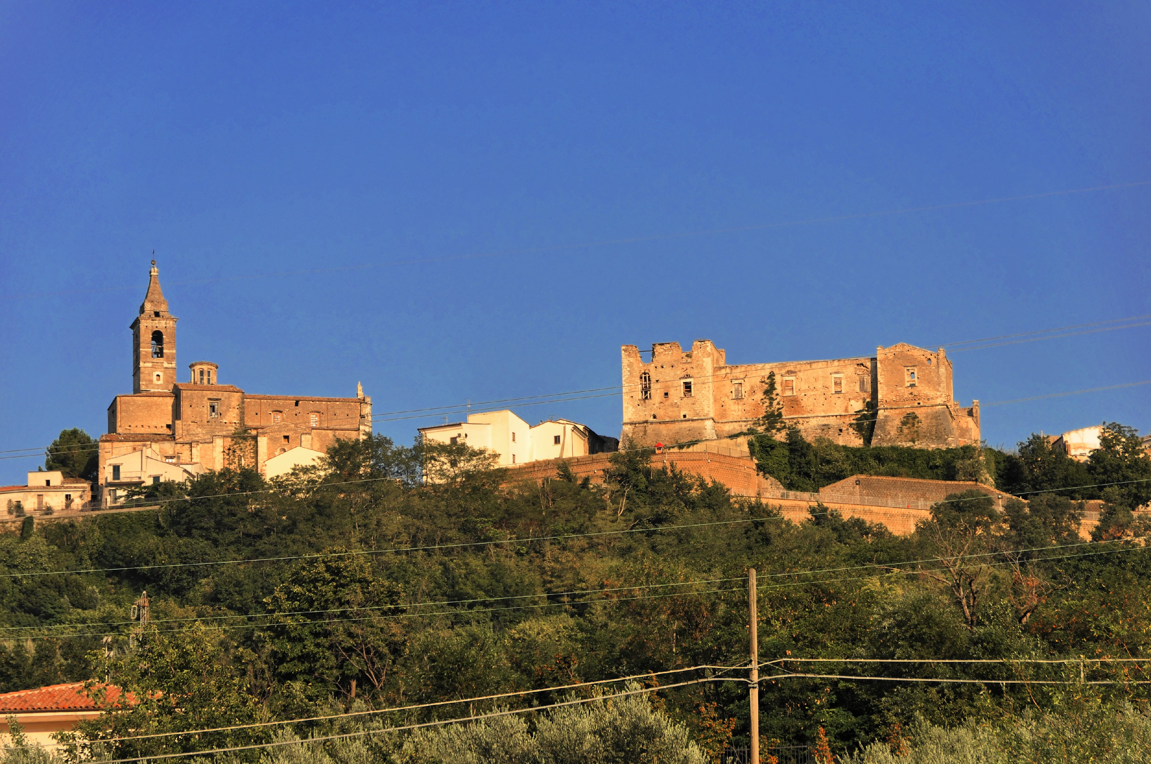 Tocco da Casauria 2013